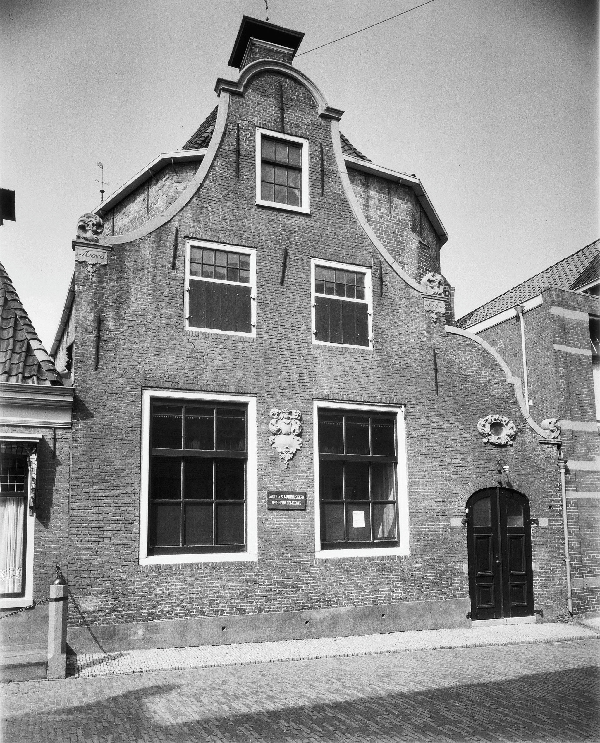 N.H.Kerk: consistoriekamer Op de Fetze A 75